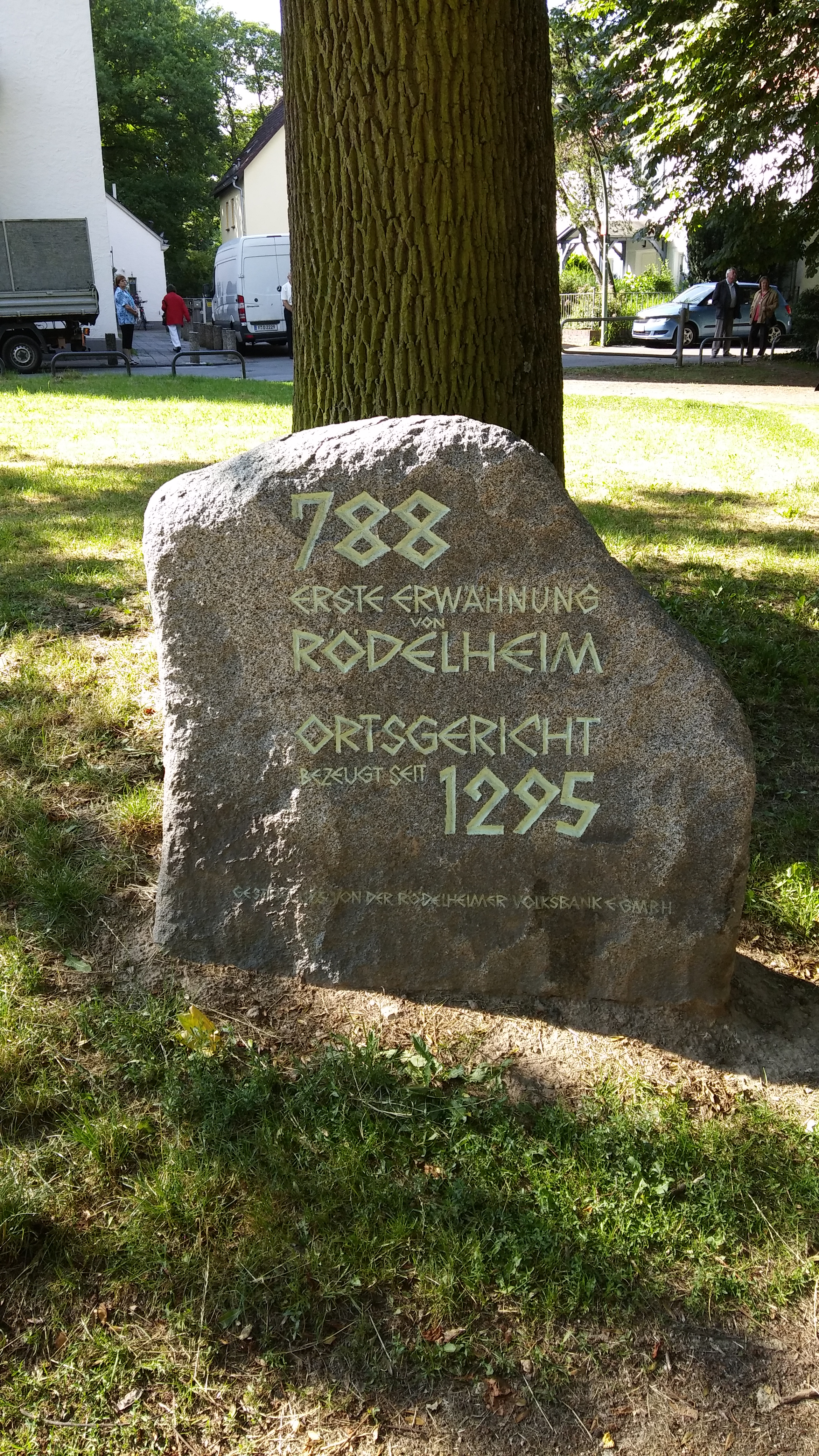 Ortsstein